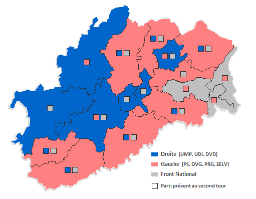 Résultats par canton du premier tour des élections départementales de 2015 en Haute-Saône